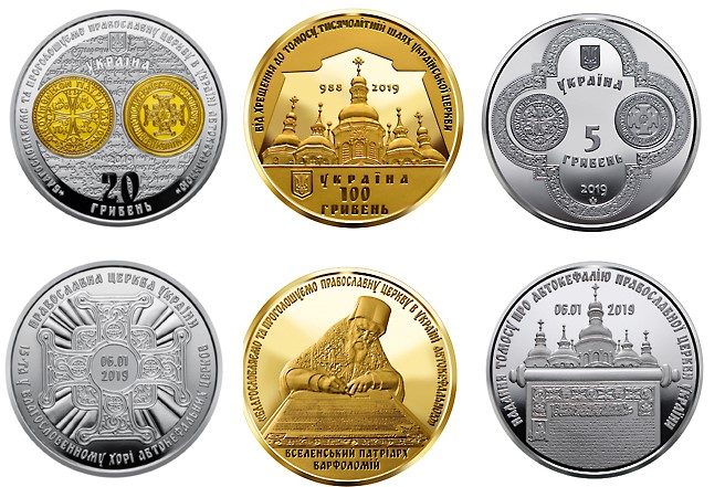 Монети присвячені події, яка є ствердженням великої історичної справедливості, гарантією духовної свободи нашого народу. Томос, текст якого ухвалено архієрейським синодом Вселенського патріархату, офіційно затверджує канонічний автокефальний статус Православної церкви України як однієї з 15 помісних православних церков.